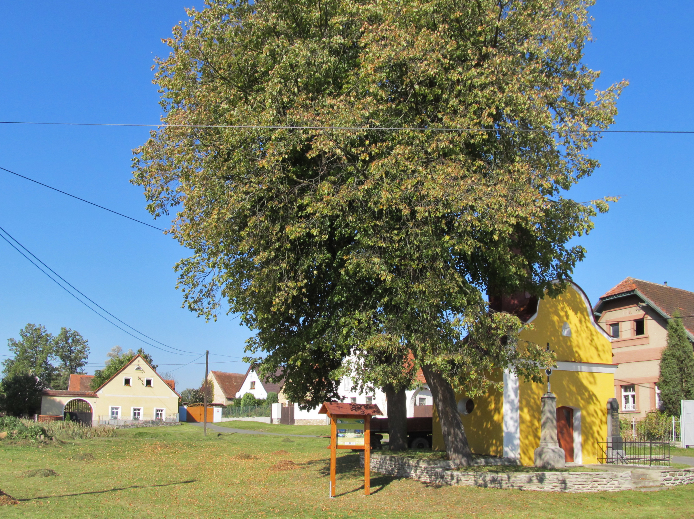 Černíč - náves s kaplí sv. Martina